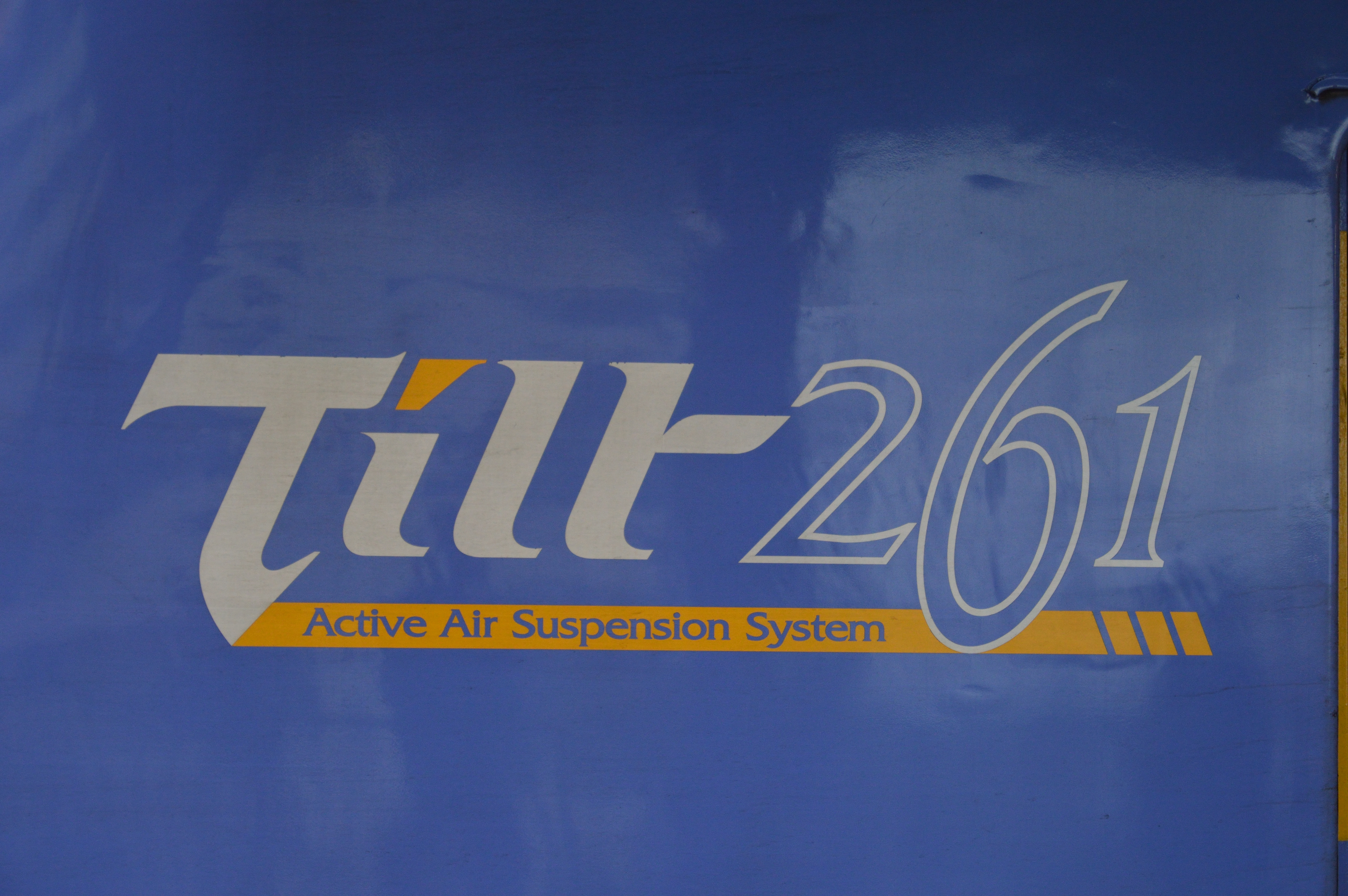 キハ261-101の先頭部ロゴ（登場時～変更前）